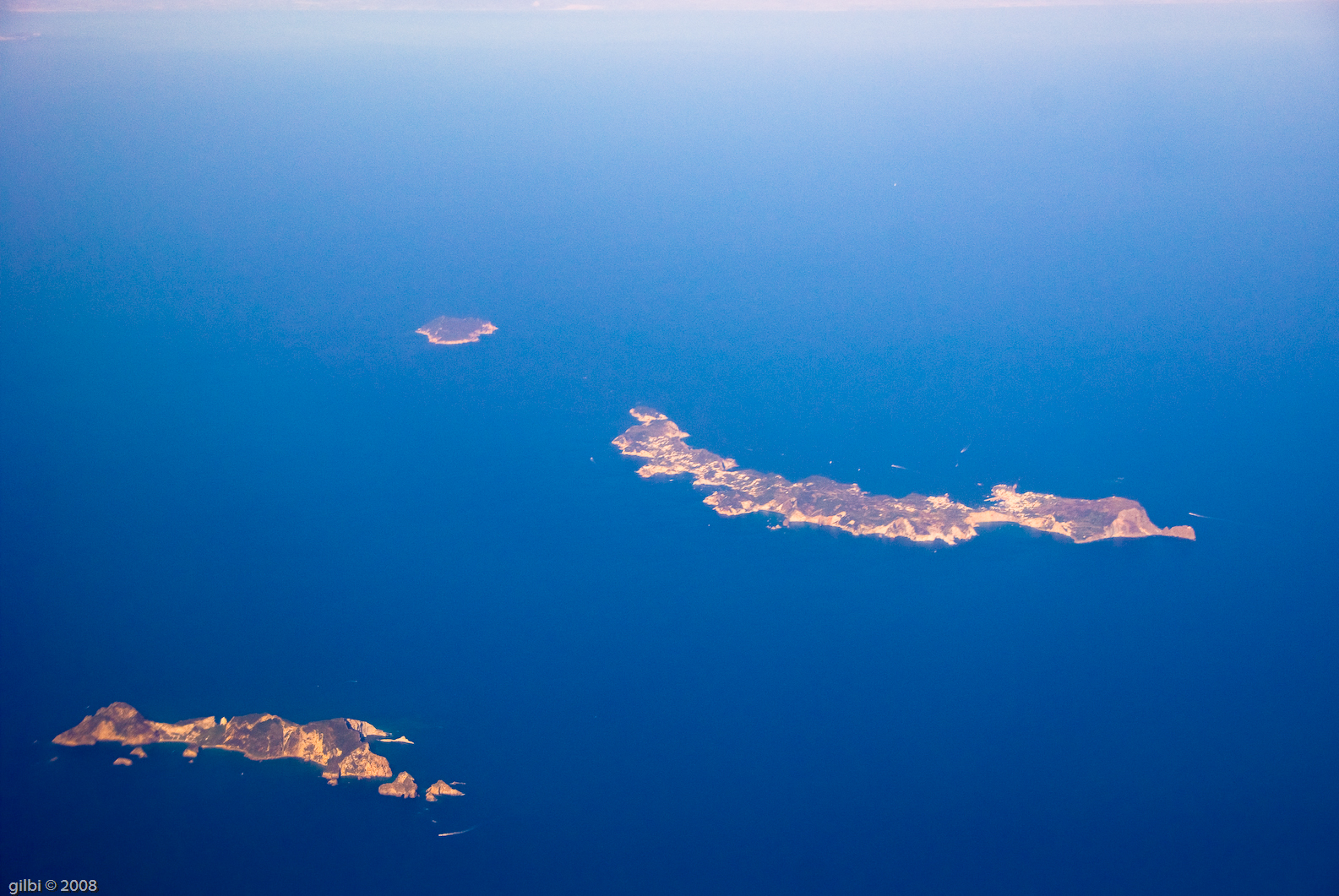 Isole Ponziane, Italia.